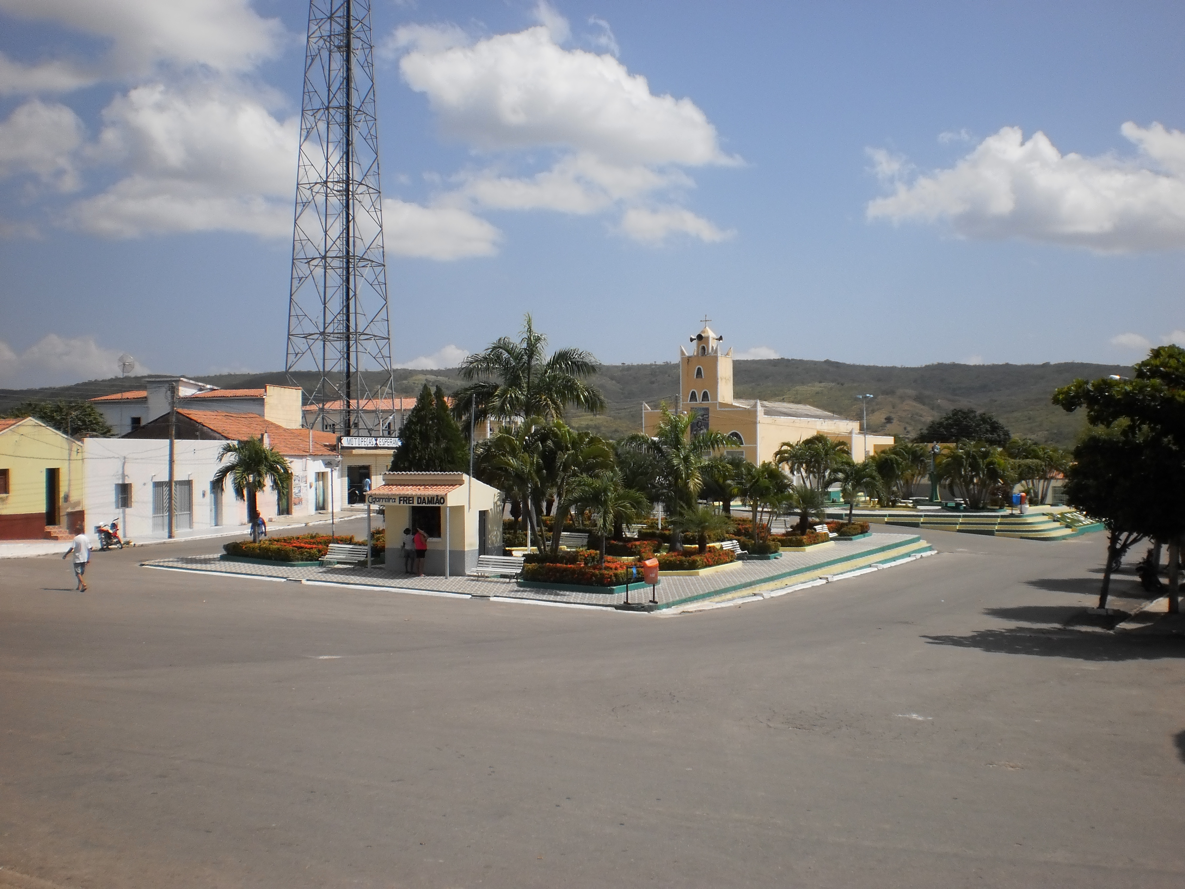 Centro de Coronel João Pessoa, Rio Grande do Norte, Brasil.